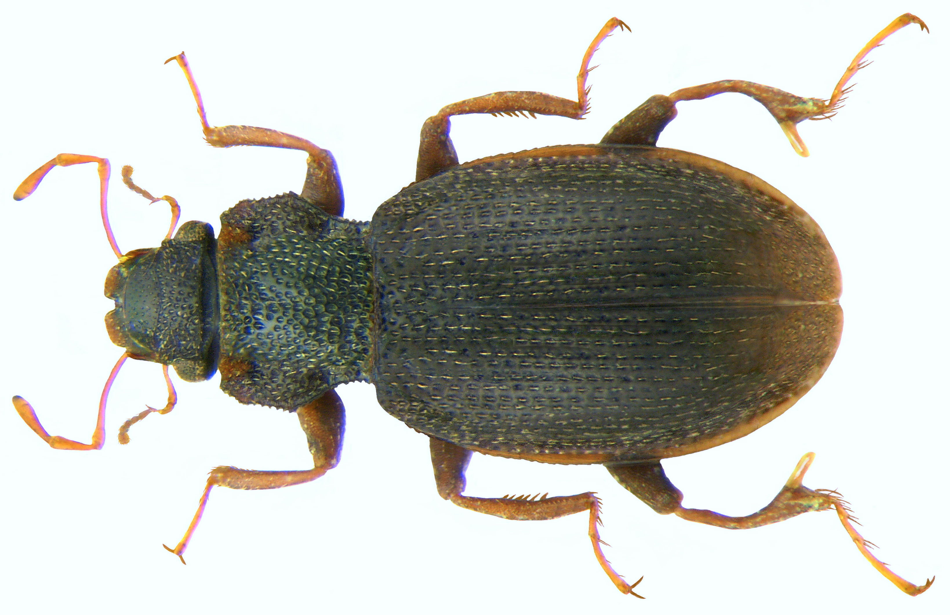 Familie: Hydraenidae Groesse: 2,64 mm Fundort: Nepal, Manaslu Mts., Ngadi Khola Valley, 2200 m leg. J.Schmidt, 2005; det Skale & Jäch, 2008 Paratype Foto: U.Schmidt, 2008